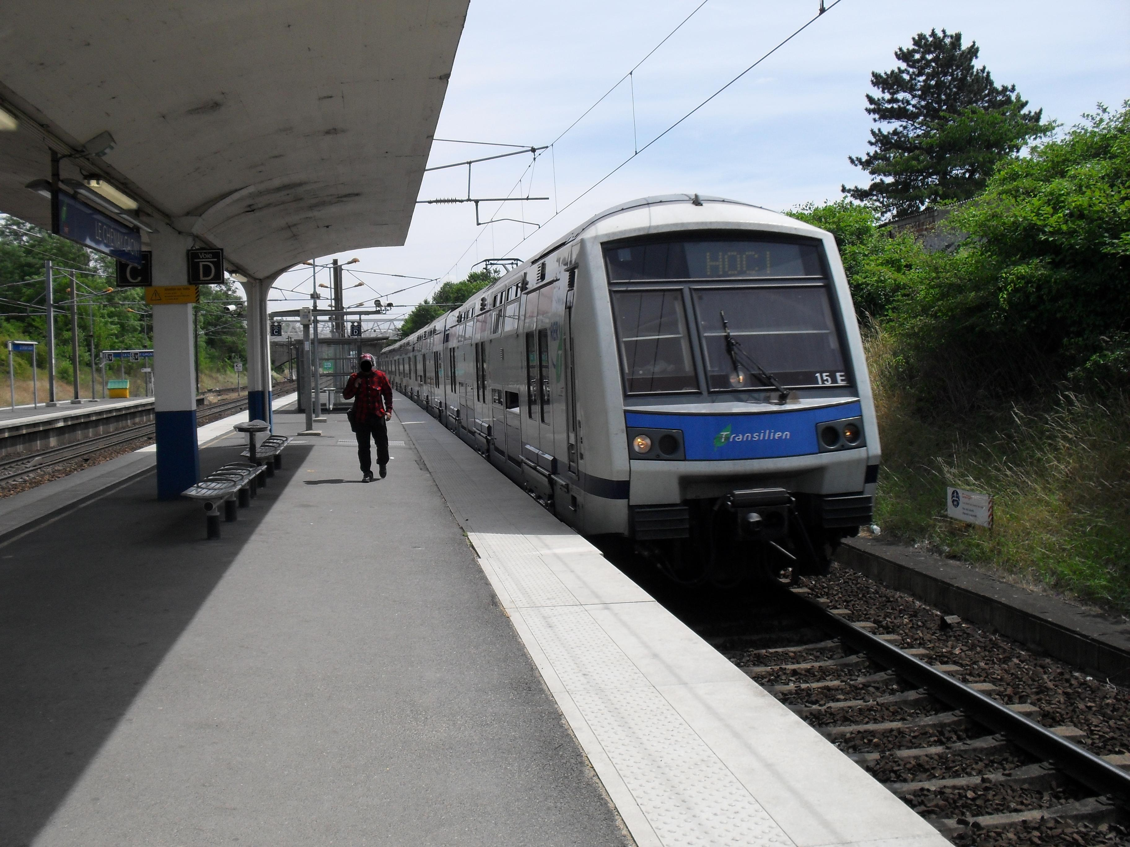 RER E - Gare du Chénay-Gagny